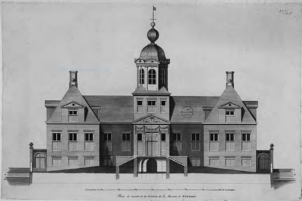 WIki